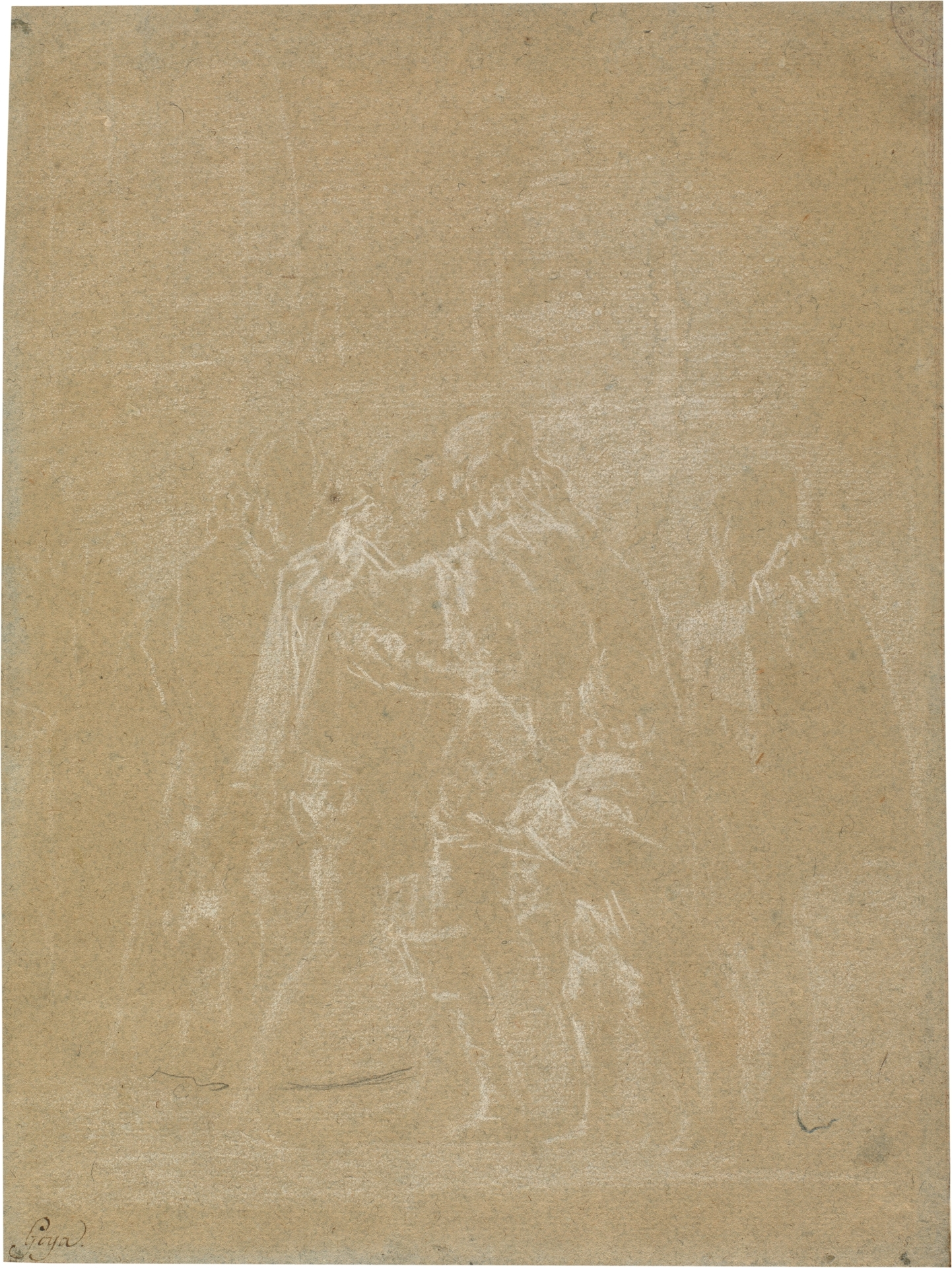 Despedida de San Francisco de Borja de su familia. Dibujo preparatorio, clarión sobre papel verjurado, azulado, 291 x 219 mm.